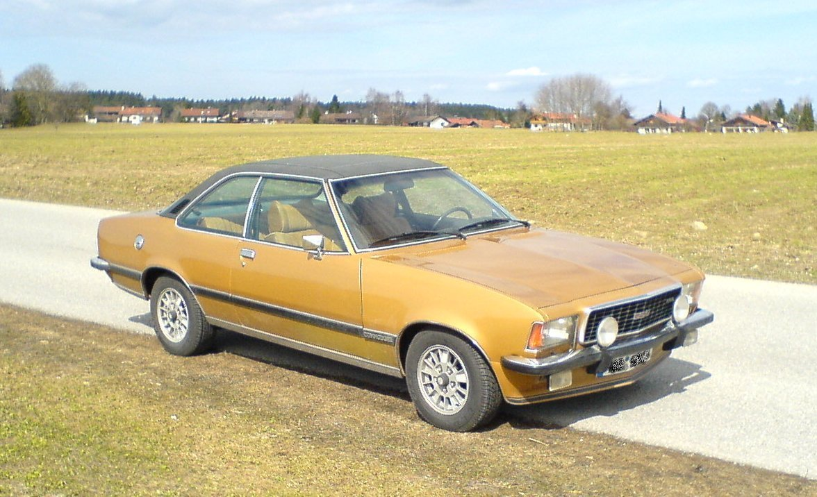 Bildbeschreibung: Opel Commodore B GS/E Coupe Fotograf/Zeichner: Christian Buß Datum: 01.05.2006 andere Versionen: nicht vorhanden --Matt314 00:45, 22. Apr 2006 (CEST)